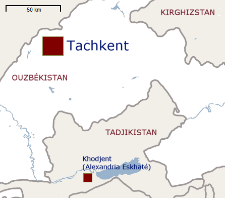 Emplacement de la ville de Tachkent